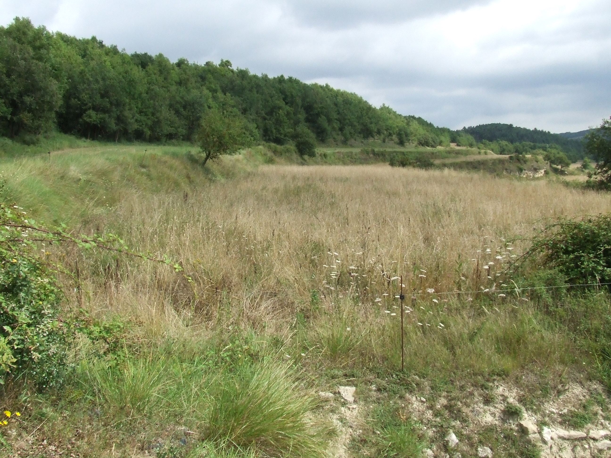 Els Camps del Portet (Castellcir, Moianès)